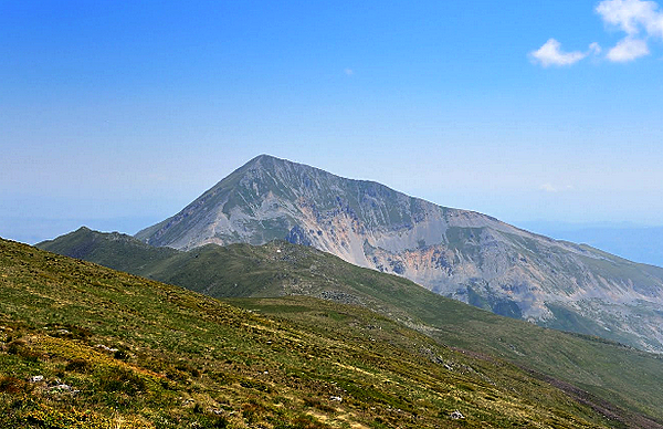 Општина Јегуновац